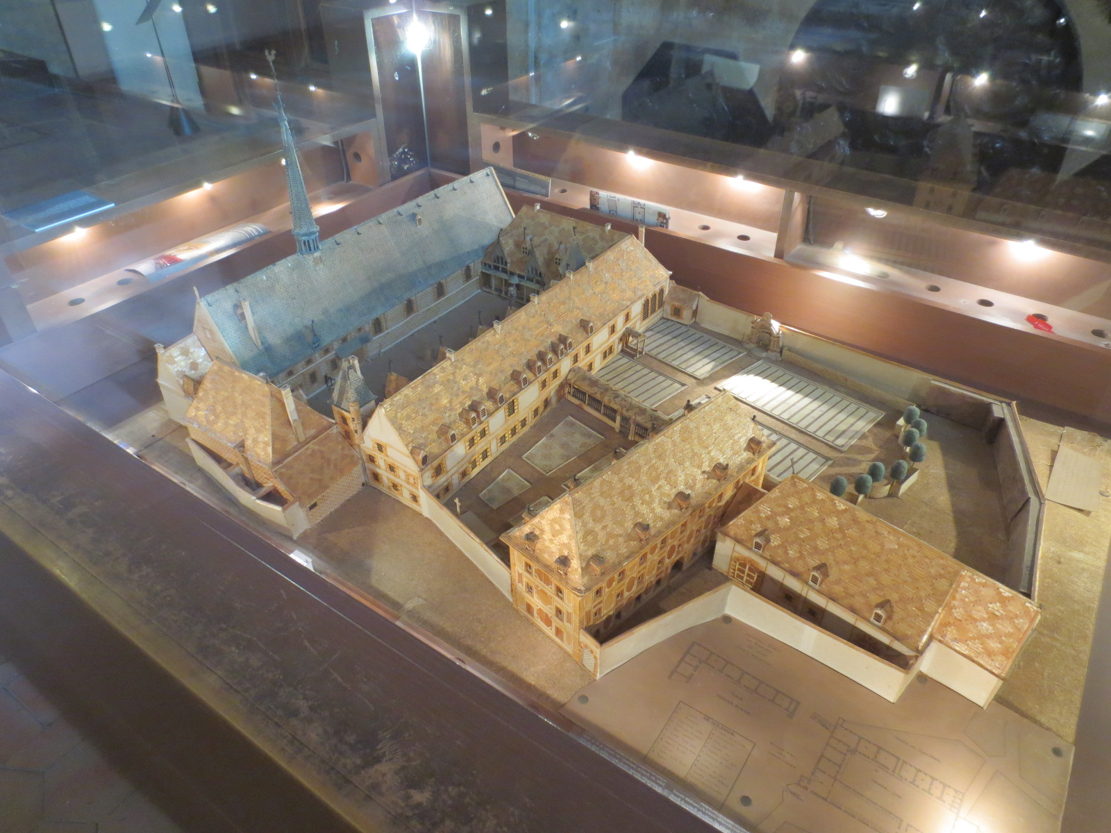 Salle Saint Nicolas Hôtel-Dieu de Beaune